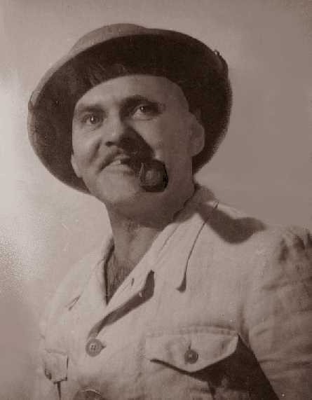 Ladislav Mikeš Pařízek, český cestovatel, dobrodruh a spisovatel